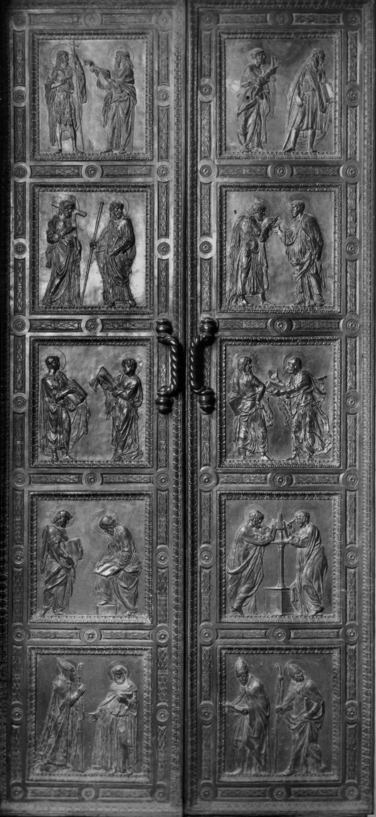 Sagrestia Vecchia di San Lorenzo a Firenze, "Porta degli Apostoli" di Donatello. Fotografia Alinari del 1852.